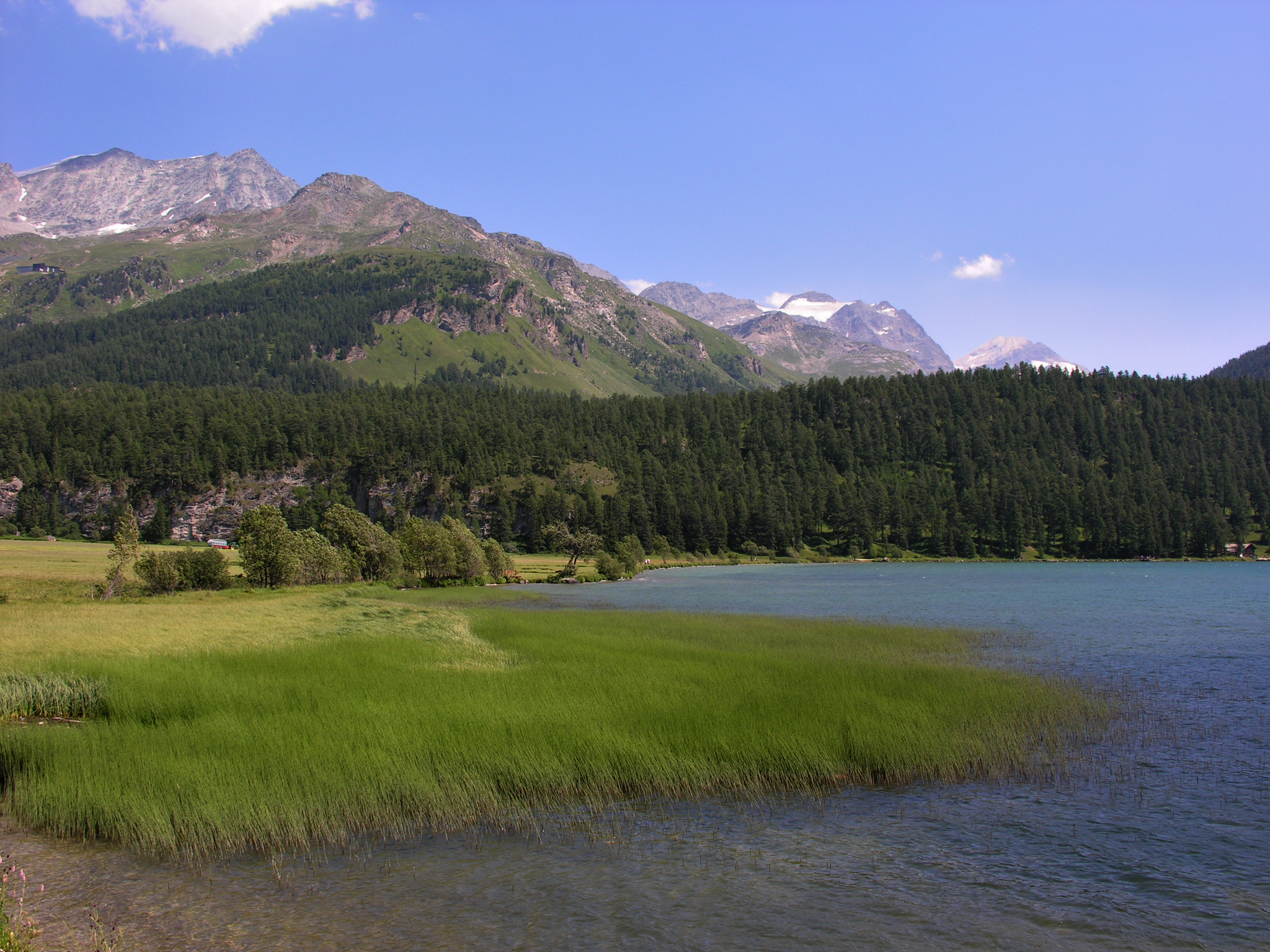 Switzerland, Graubünden, Lake Sils